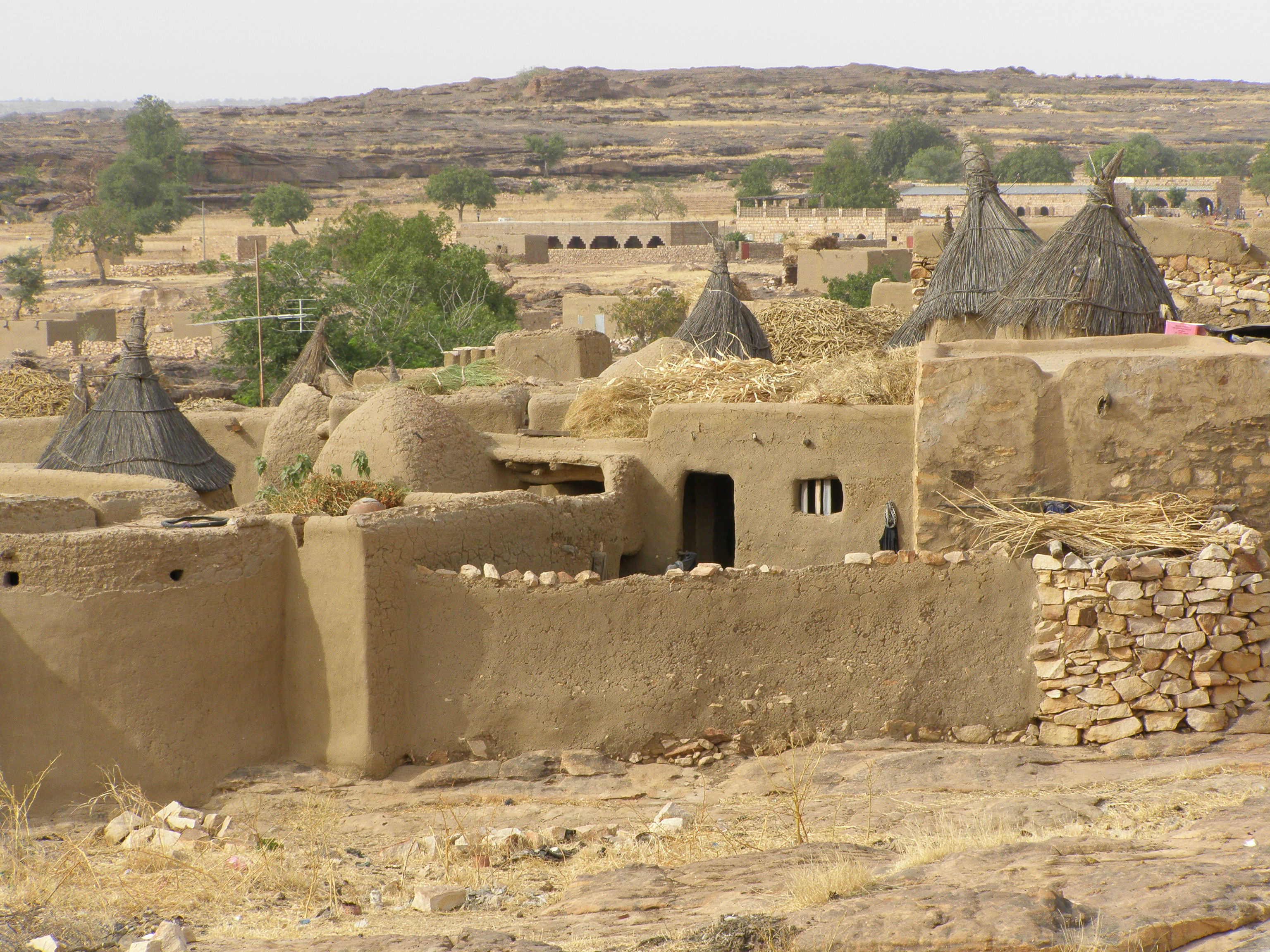 Vue de Sangha (Mali)